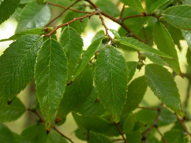 Feuilles et graines de Zelkova Zelkova leaves and seeds